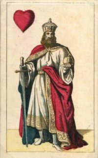 eine Spielkarte, gestochen von Georg Pommer. Jeu historique allemand (Deutsche Geschichtskarte): J.C. Jegel, Nuremberg, 1850, graveur Georg Pommer, taille-douce (eauforte ?) couleurs au pochoir, 32 / 32 cartes, ens. all., 101 x 62 mm; signé sur le Ober de feuilles (à l'envers, sur le papier que tient le personnage): « G . Pommer / ~~ / rad. d. 3 April / 1850 »